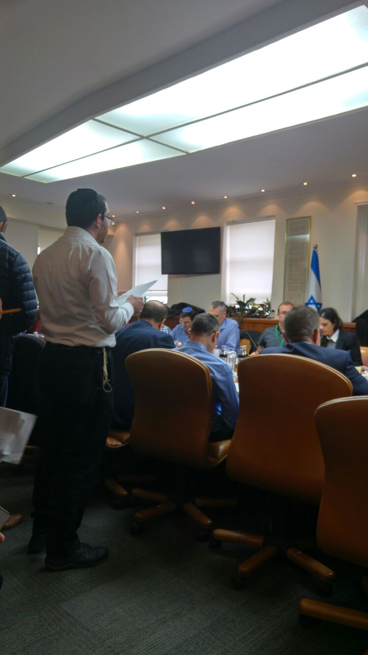 ועדת השרים לענייני חקיקה